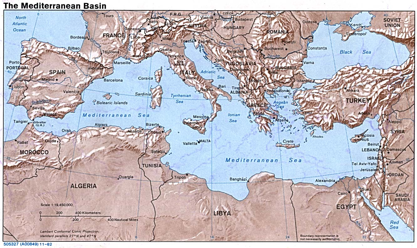 Mediterranean rel82